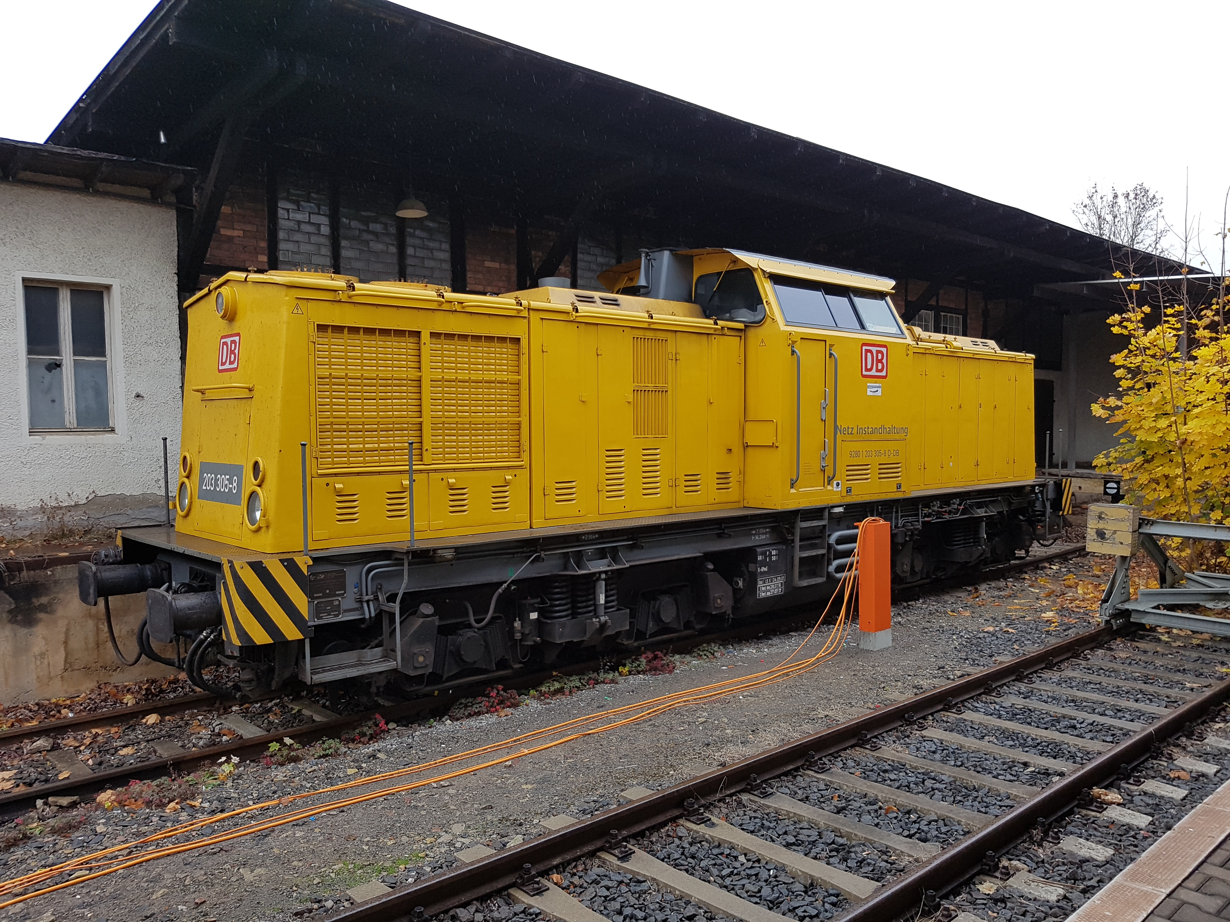 Lokomotive der DB Netz Instandhaltung in Meiningen